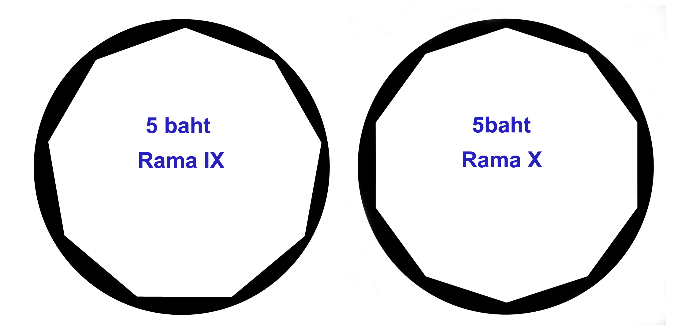 Het ontwerp van de 5-baht munten van Rama IX en Rama X verschilt in het aantal hoeken dat de binnenrand van de munt heeft. Het aantal hoeken is gelijk aan het volgnummer bij Rama.